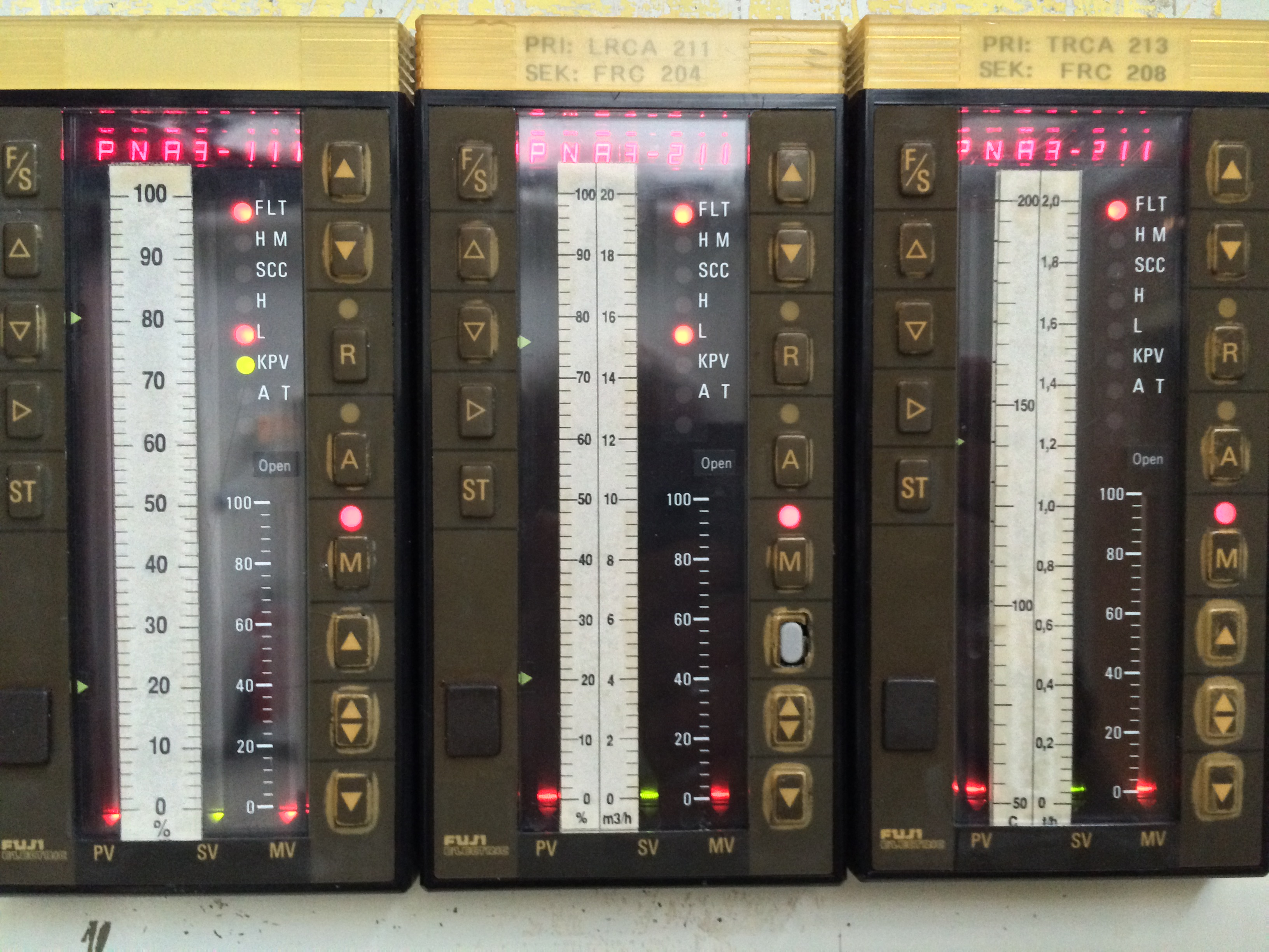 The front display of three industrial PID controllers.